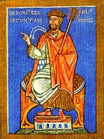 Miniatura procedente do Tumbo A da Catedral de Santiago, séculos X-XI, na que se representa a Ordoño II como rei.